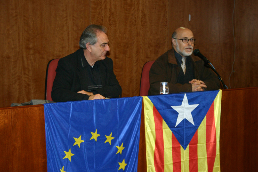 Fèlix Martí i Ambel en un acte d'Òmnium a Igualada en motiu del rebuig al Tractat Constitucional Europeu.